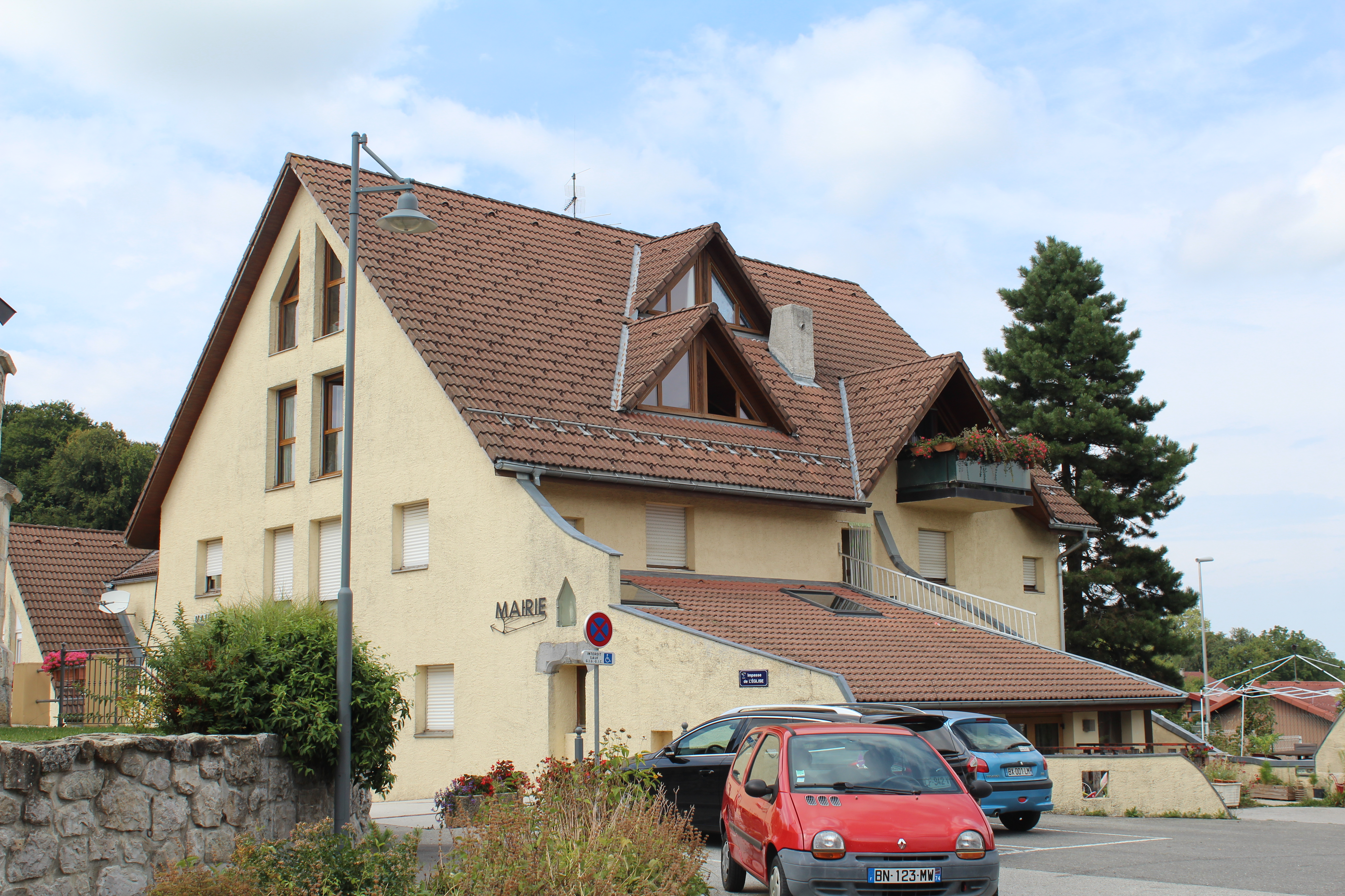 Mairie d'Arbusigny.